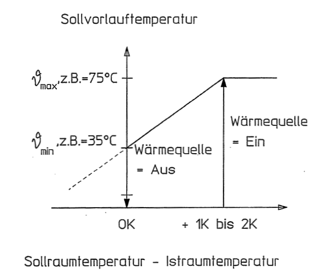 Vorlauftemperatur als Funktion der Regeldifferenz